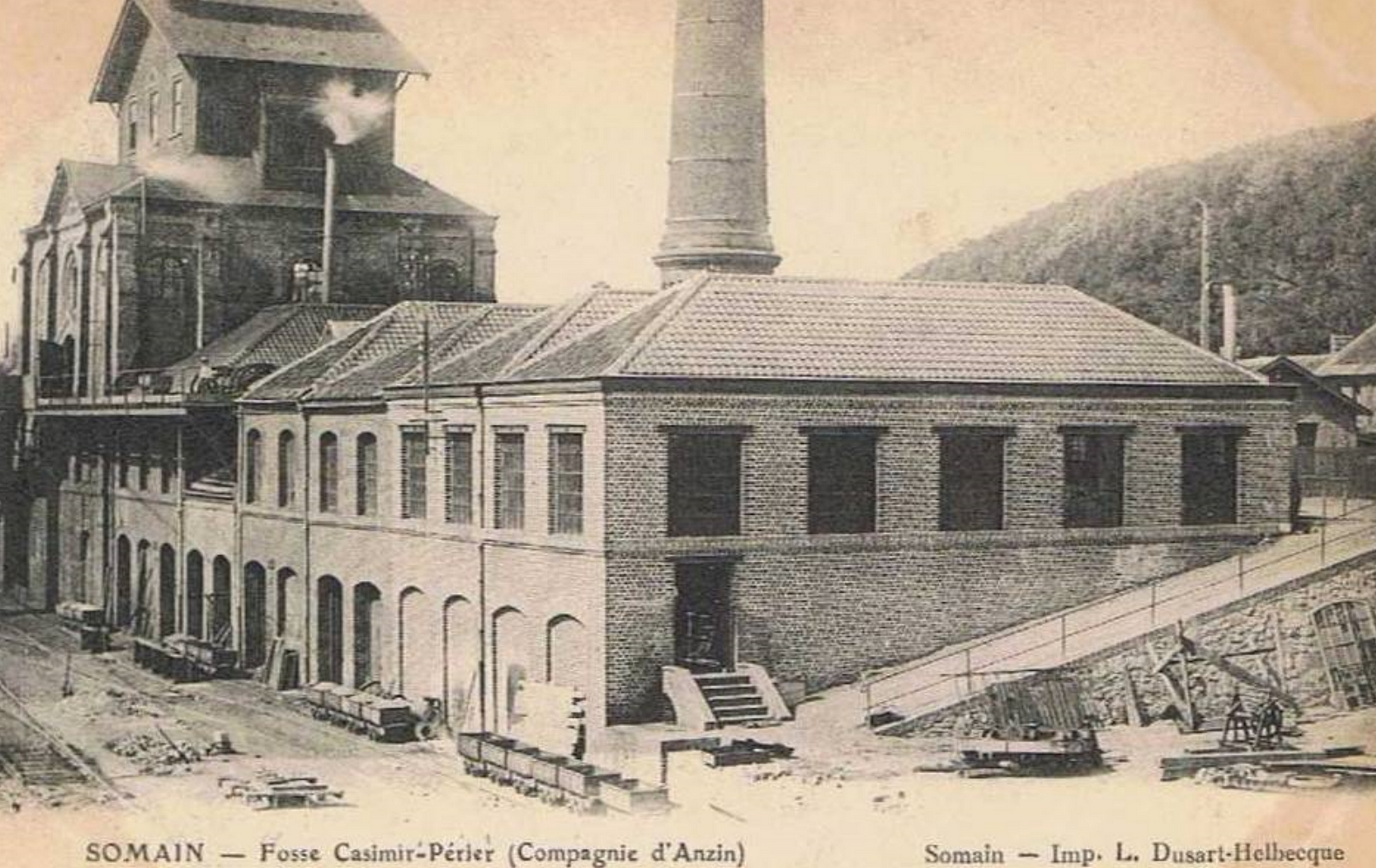 Fosse Casimir Périer de la Compagnie des mines d'Anzin, Somain, Nord, Nord-Pas-de-Calais, France.